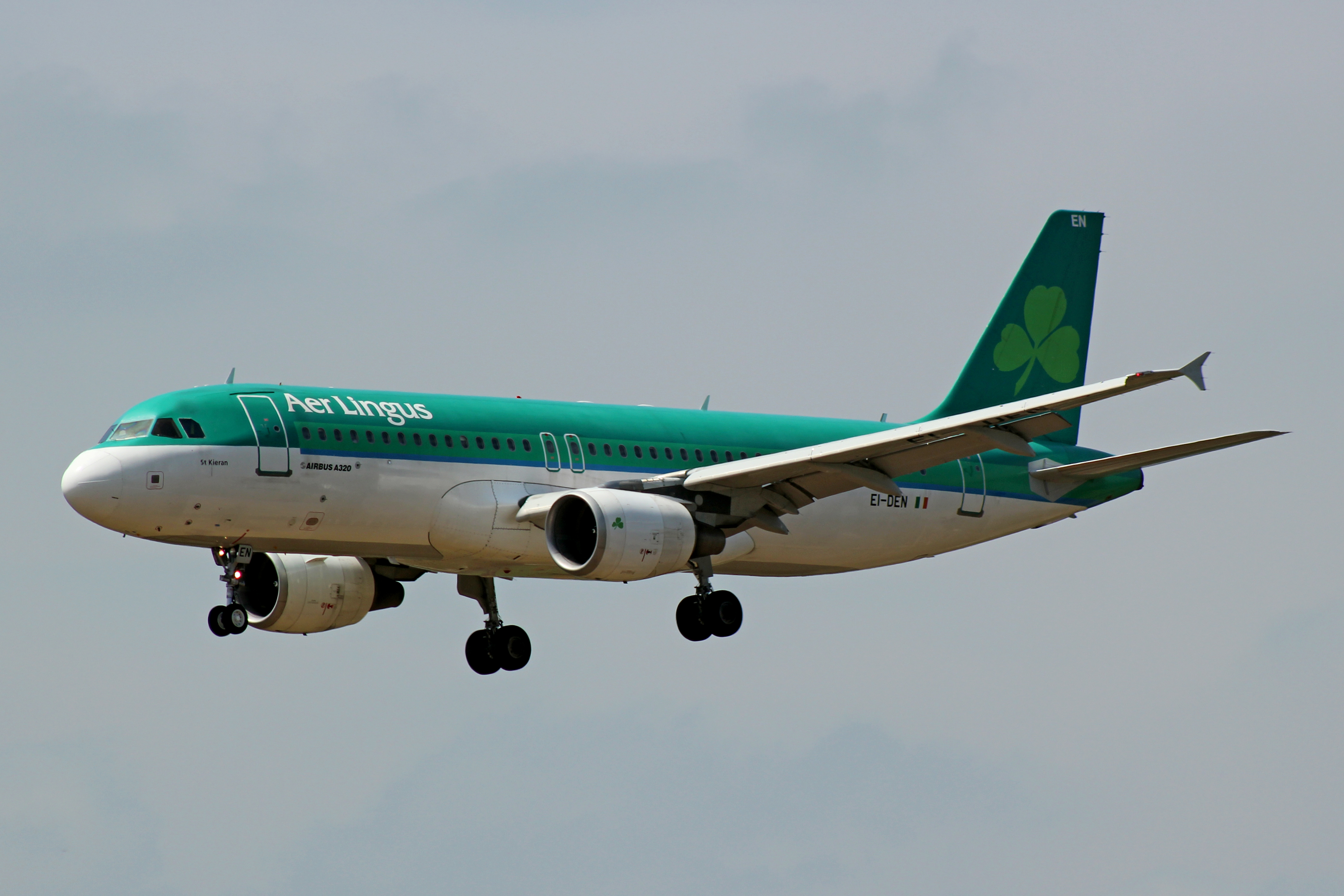 Airbus A320 de Aer Lingus aterrando no aeroporto de Santiago de Compostela.